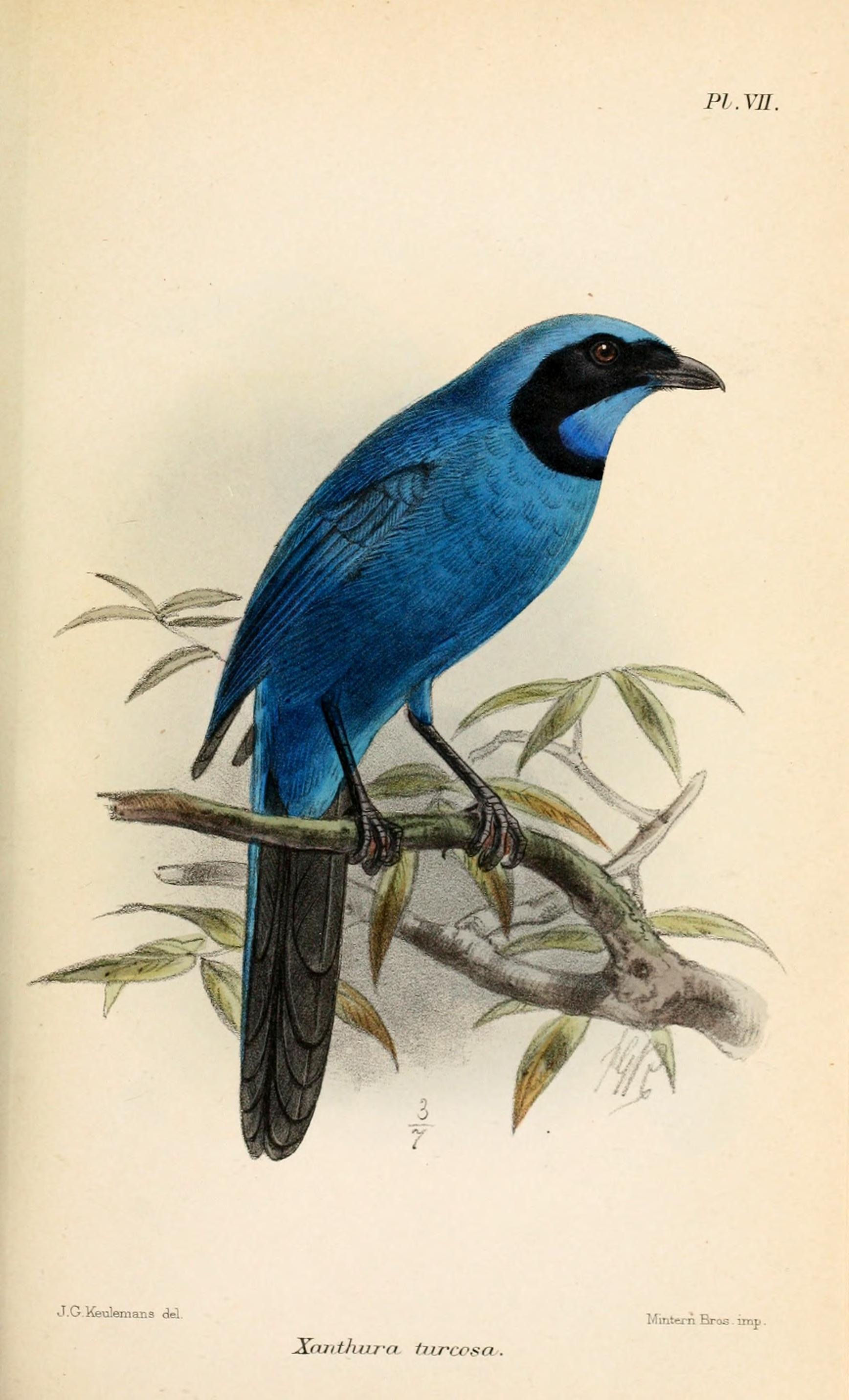 Xanthura turcosa = Cyanolyca turcosa, Turquoise Jay